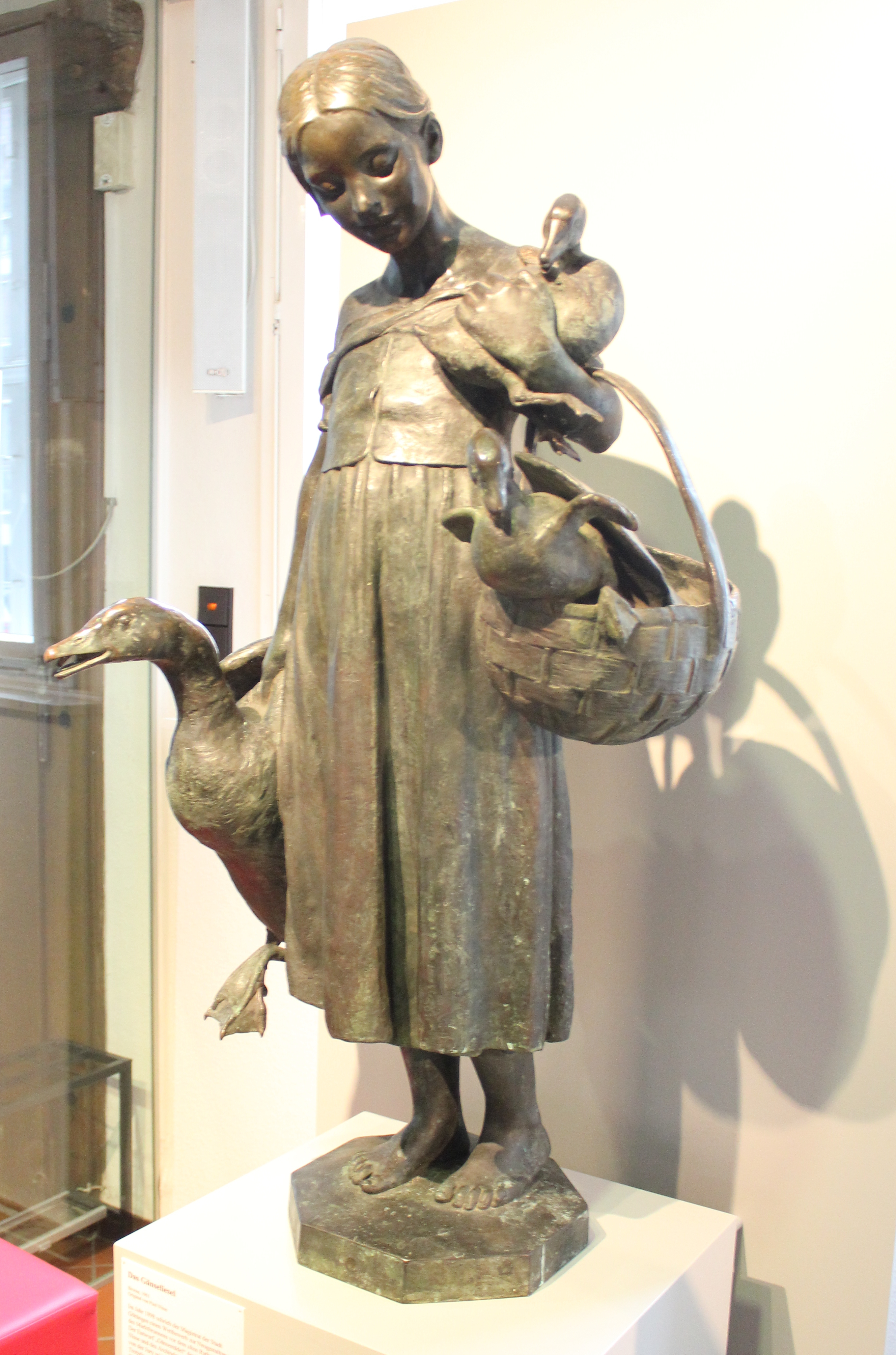 Das Gänseliesel (Gänsemädel) - Das Original vom Städtischen Museum von Paul Nisse (Bronze, 1901)